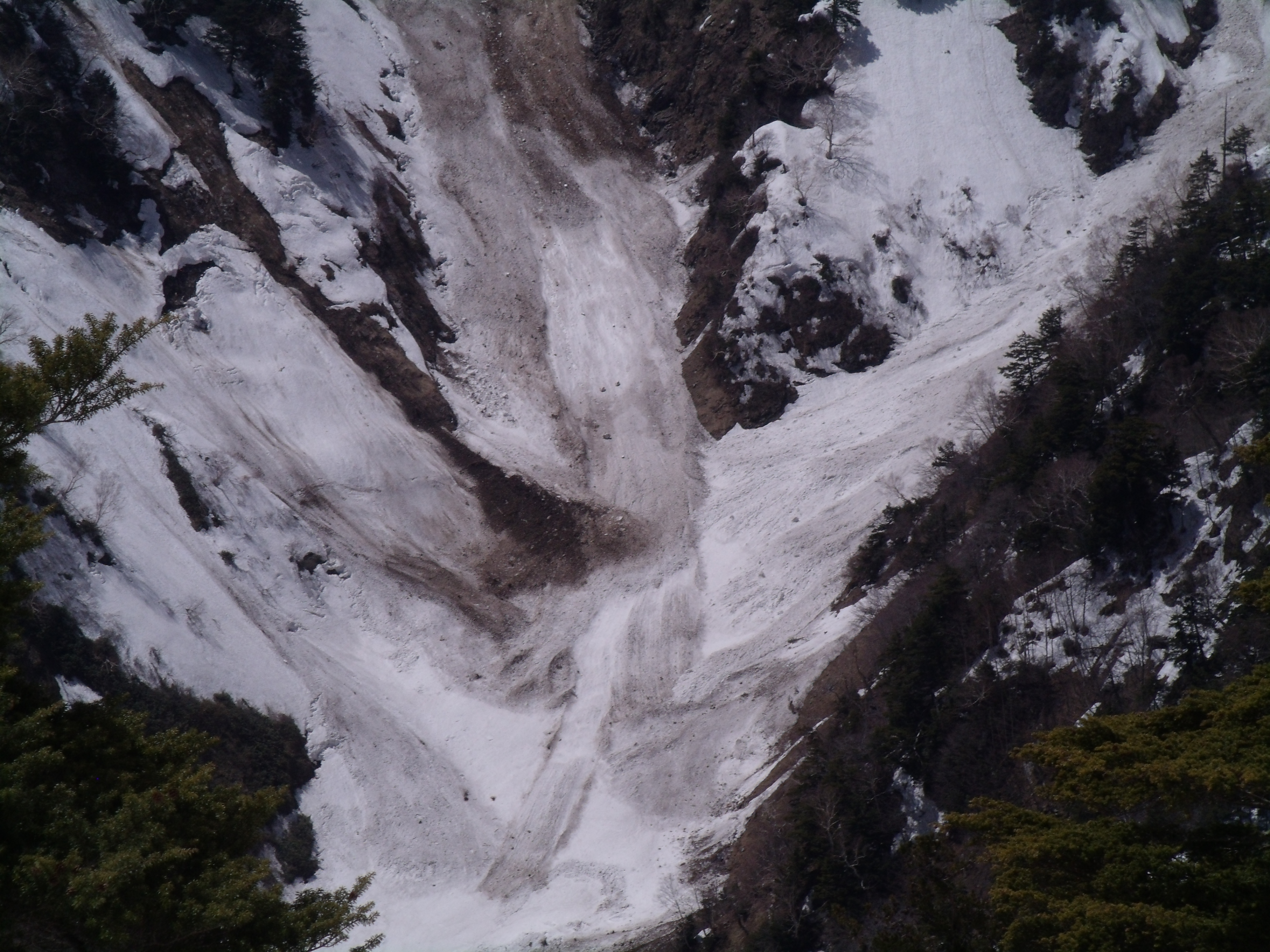 北アルプス扇沢付近での全層雪崩